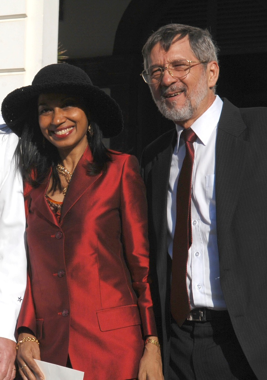 Daniel et Patricia Vaxelaire